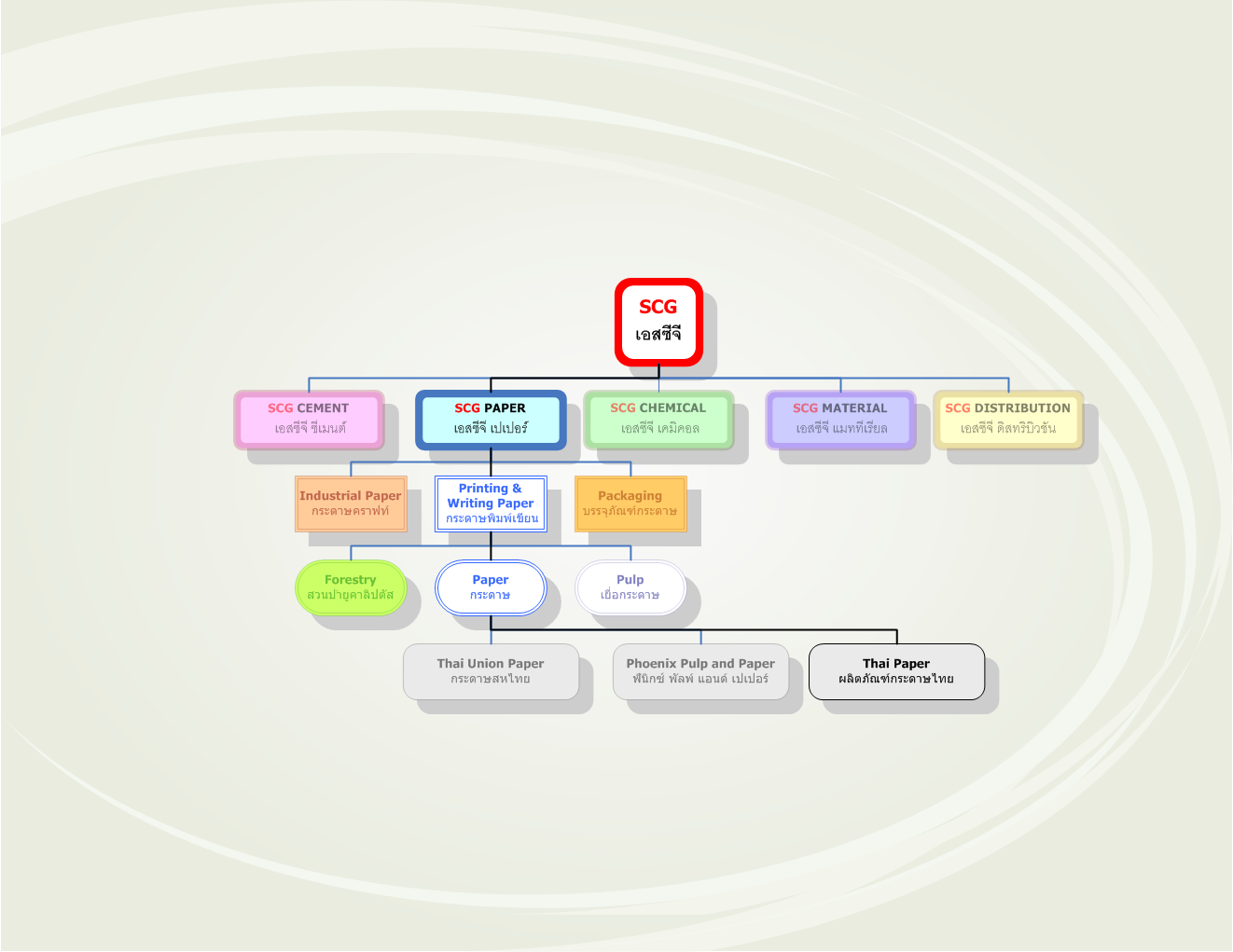 ภาพแสดงผังองค์กรของ บริษัท ผลิตภัณฑ์กระดาษไทย จำกัด